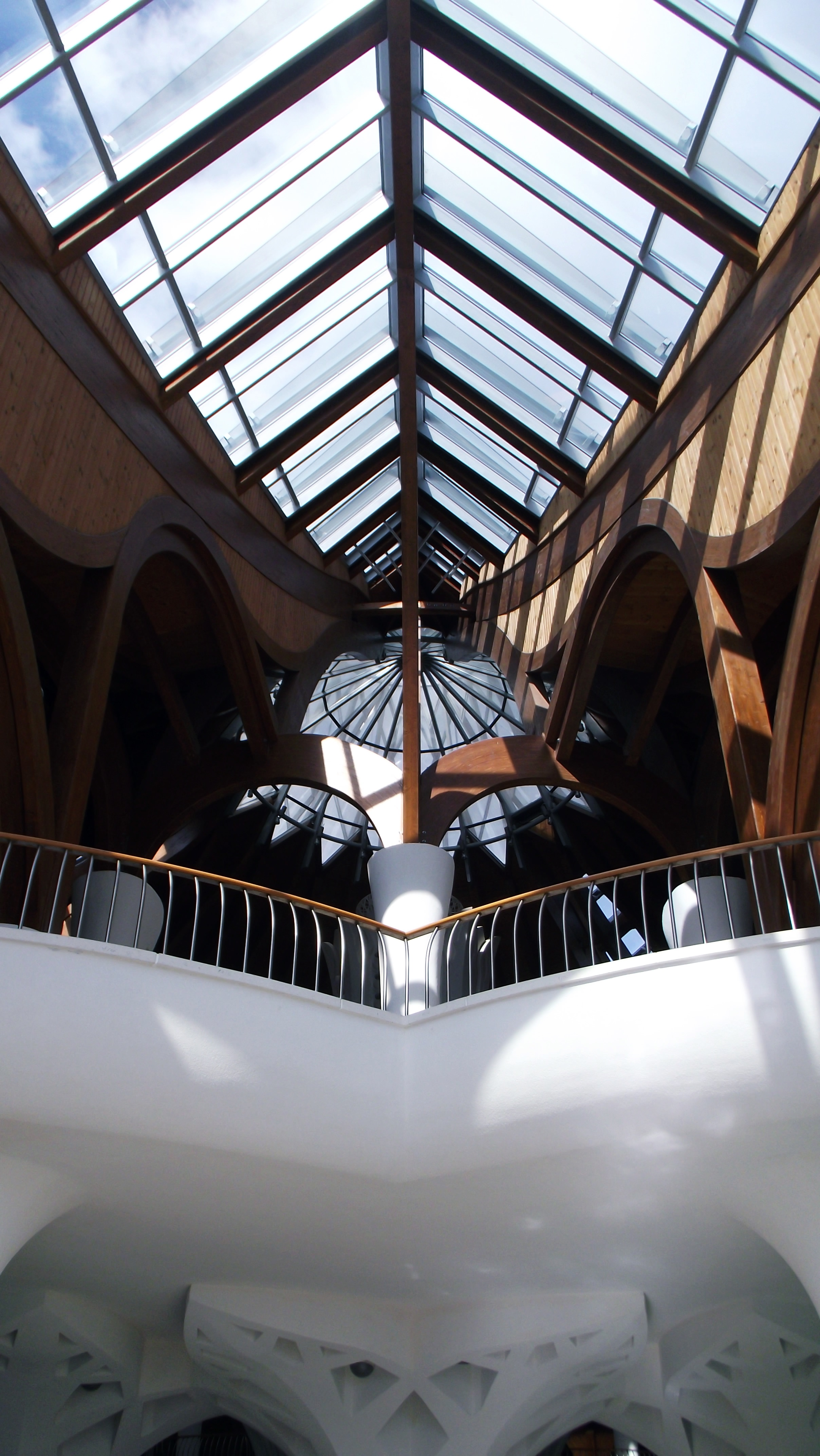 A Makói Hagymatikum 2014 nyarán. Belülről.